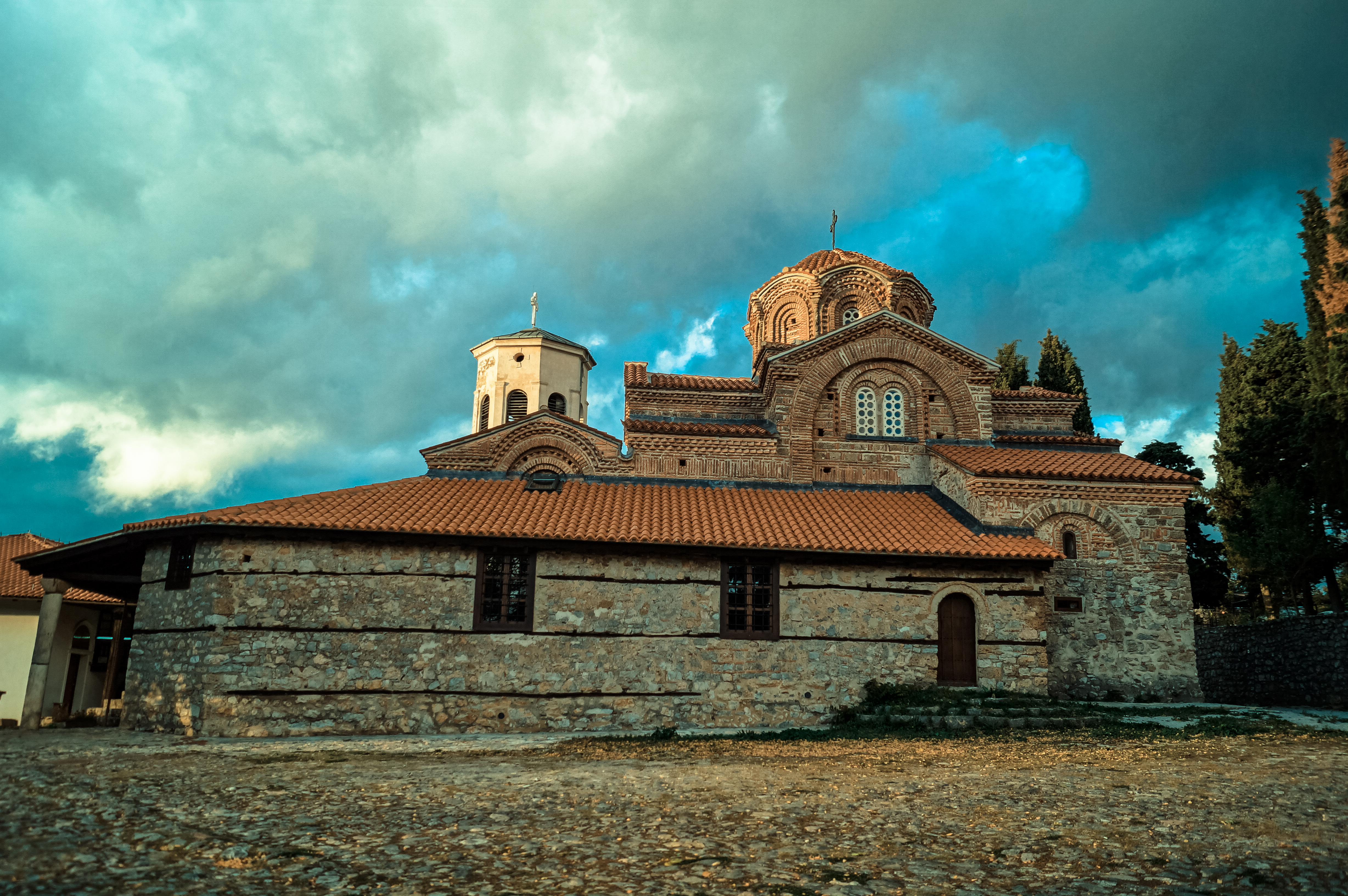 Јужниот ѕид од црквата Св. Богородица Перивлепта, Охрид, Македонија.